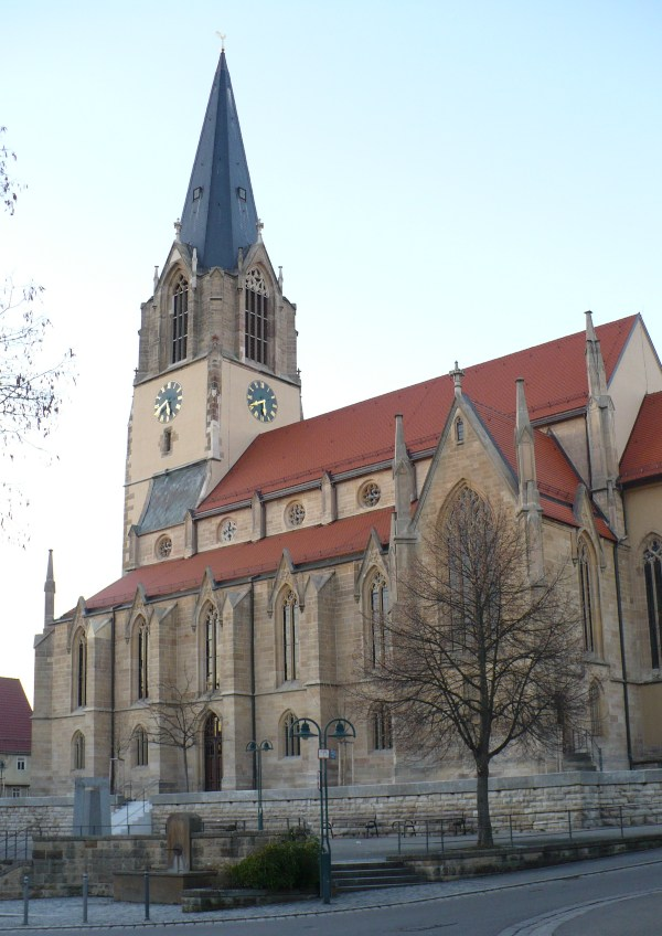 Stuttgart-Möhringen Evang. Martinskirche